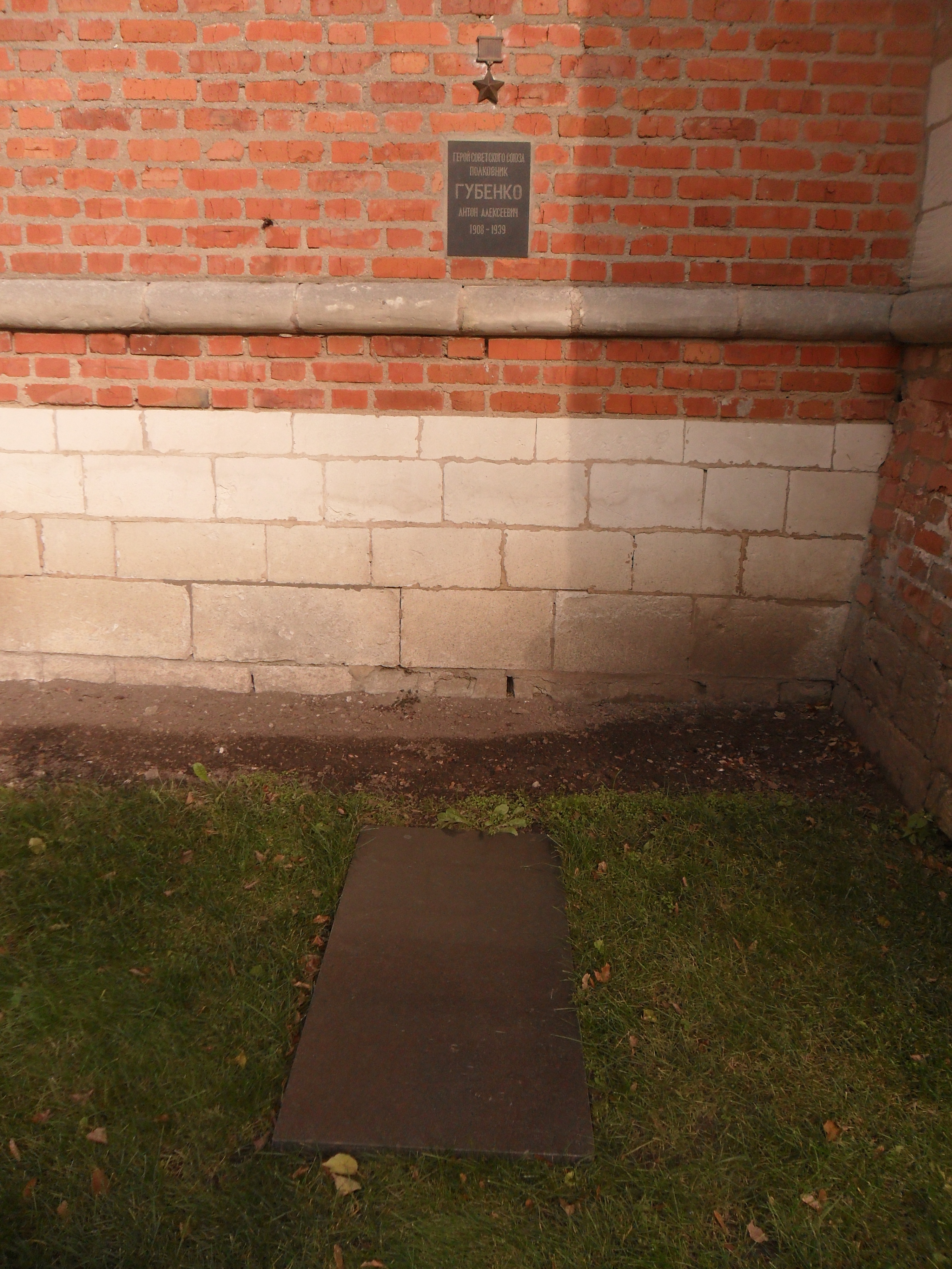 Могила Героя Советского Союза Антона Губенко в Сквере Памяти Героев в Смоленске.